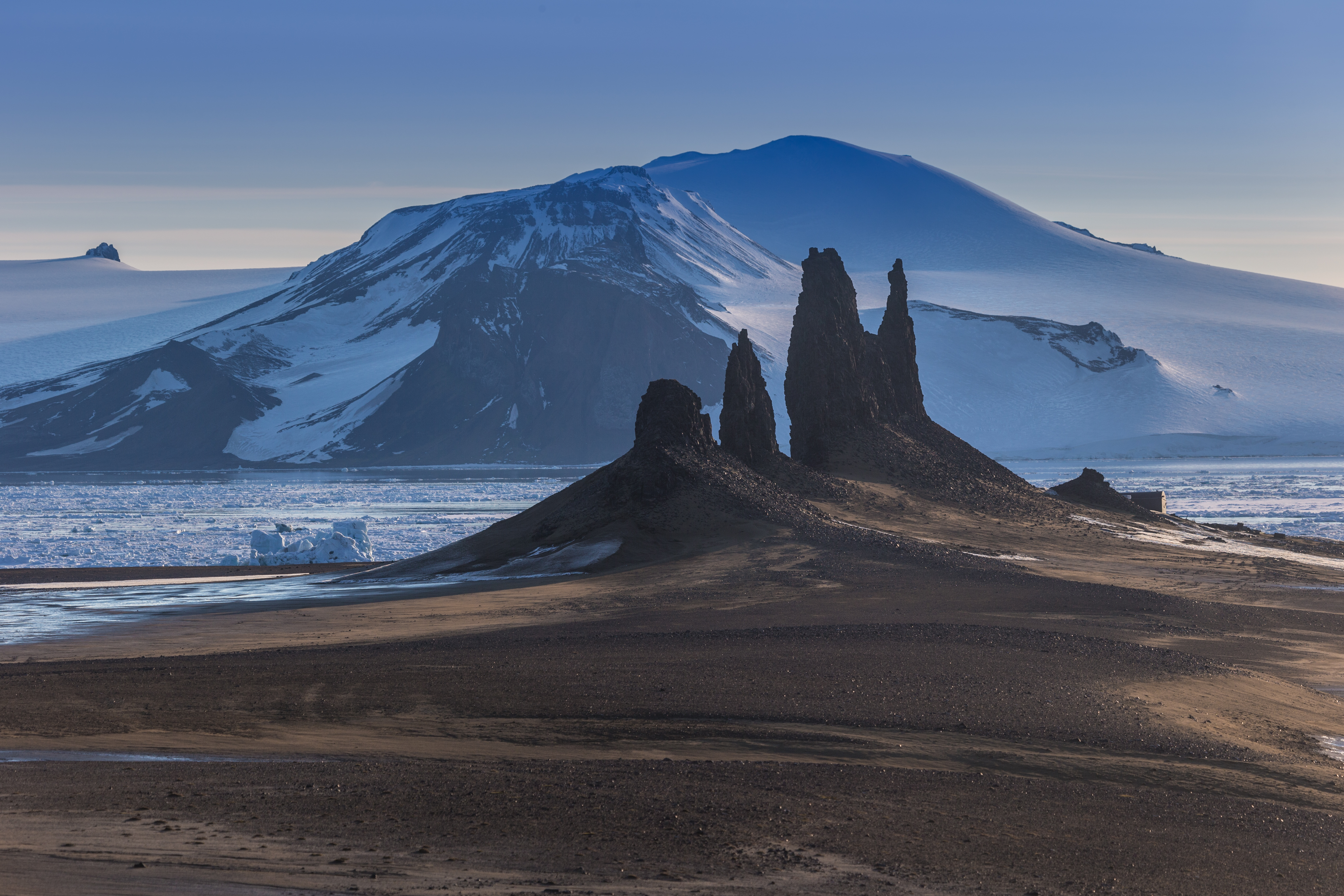 Комплексный заказник Земля Франца-Иосифа, Приморский район This image is related to the protected area of Russia number 2930163